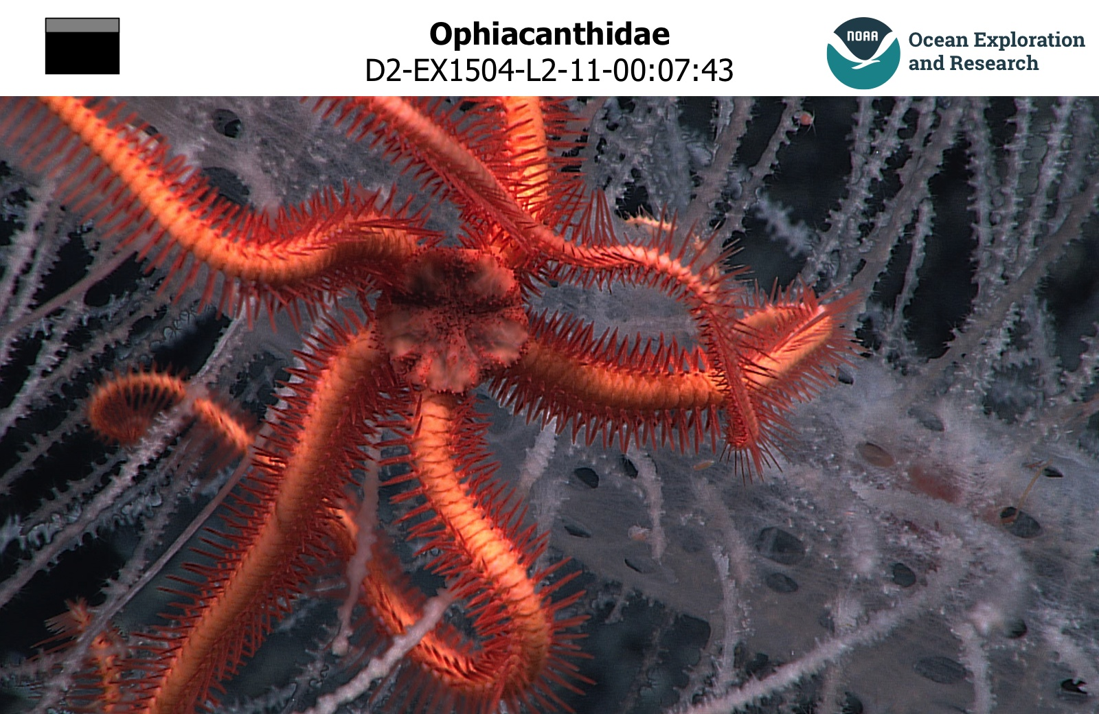 Une ophiure abyssale de la famille des Ophiacanthidae observée au large de Hawaii par la mission Okeanos Explorer